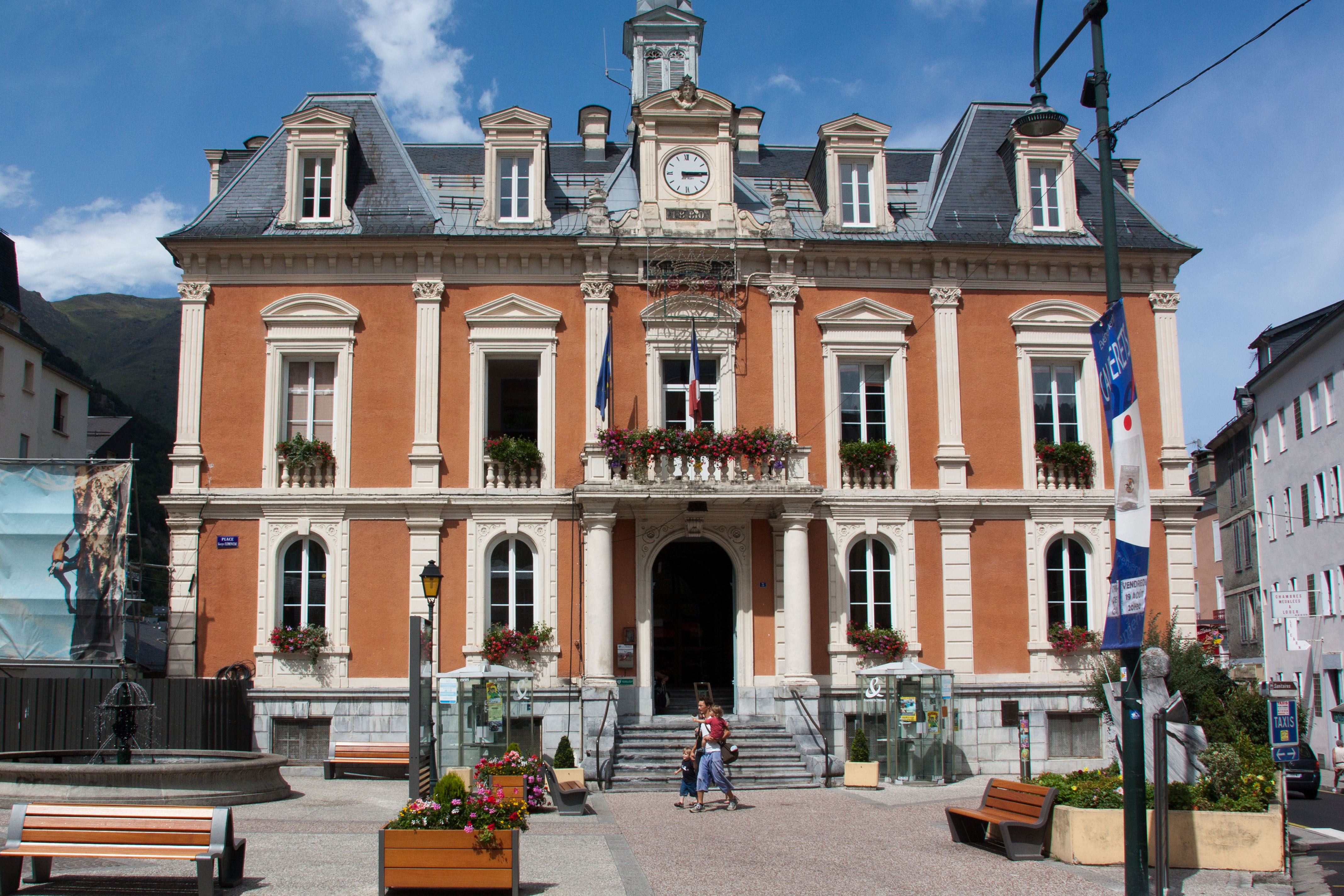 Mairie de Cauterets, Hautes-Pyrénées, France